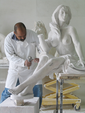 Escultor Hans Varela, ejecutando una escultura en su atelier en Lisboa Portugal, visitar su site personal en . Foto: Arq. Gretta Balin Diaz. Año: 2006.